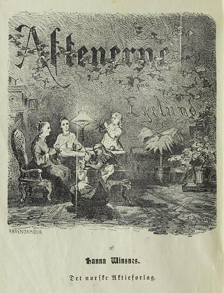 Aftenerne paa Egelund av Hanna Winsnes ; med tittelbilde av Gerhard Munthe. utgitt av Det norske Aktieforlag.